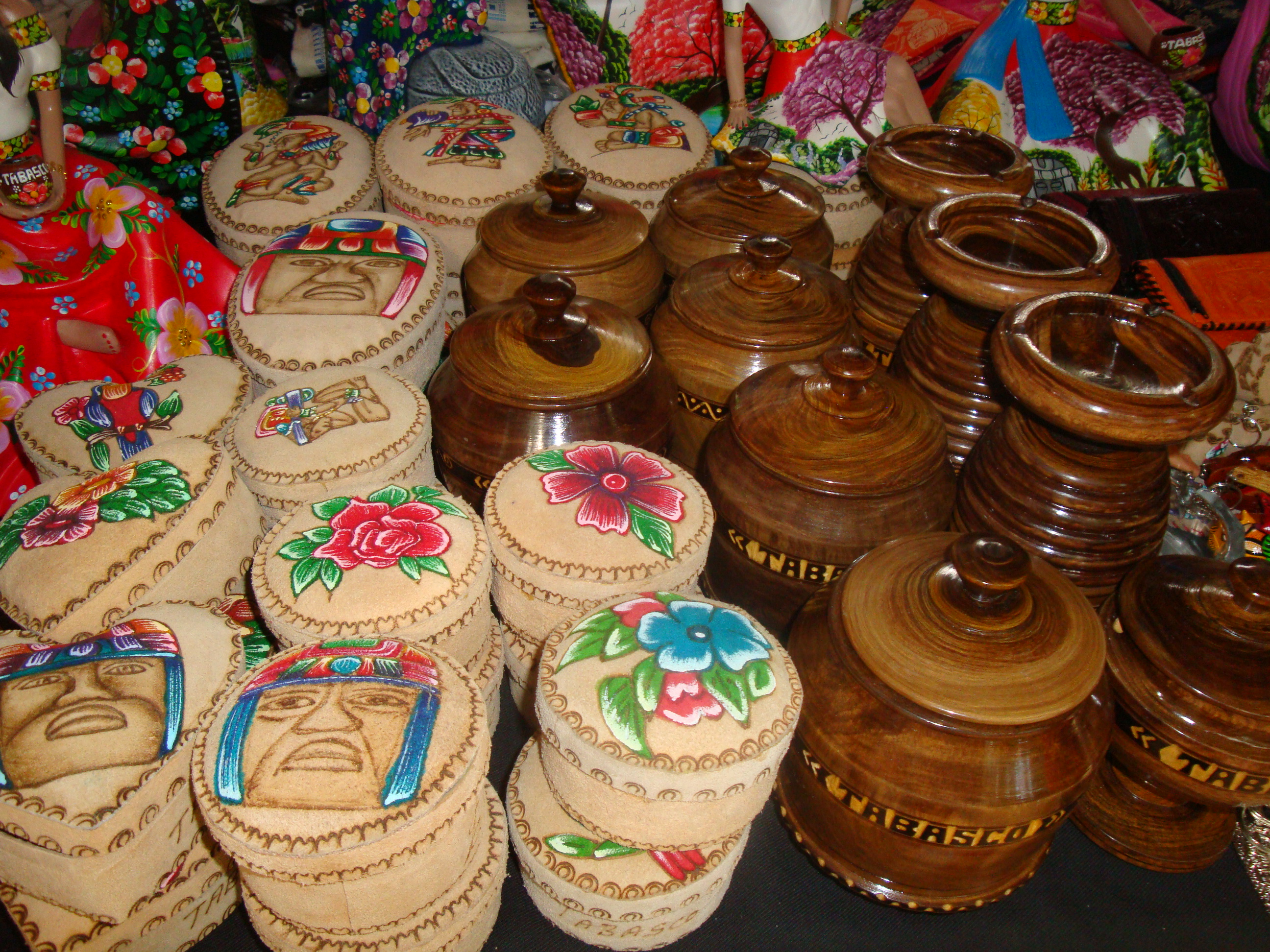 Utencilios de piel y madera decorados con pirográbados. Artesanía típica del municipio de Centro, estado de Tabasco, México.